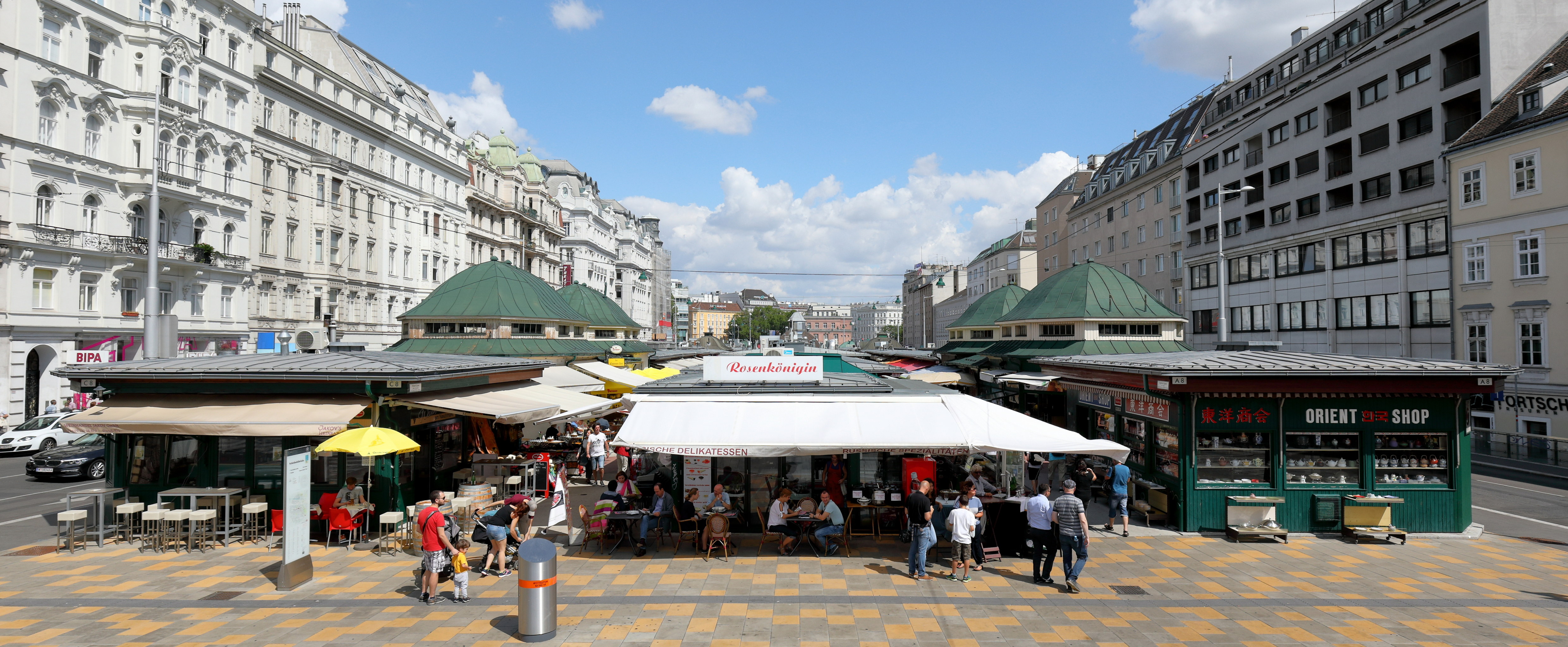 Der Naschmarkt im 6. Wiener Gemeindebezirk Mariahilf. Standort Höhe Schleifmühlgasse mit Blick Richtung Innenstadt bzw. Osten. Die fixen Marktstände am Naschmarkt wurden zwischen 1910 und 1916 errichtet und befinden sich auf der Überbauung des Wienflusses zwischen der Rechten und Linken Wienzeile.